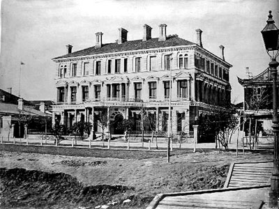 位于外滩的第一代汇丰银行大楼